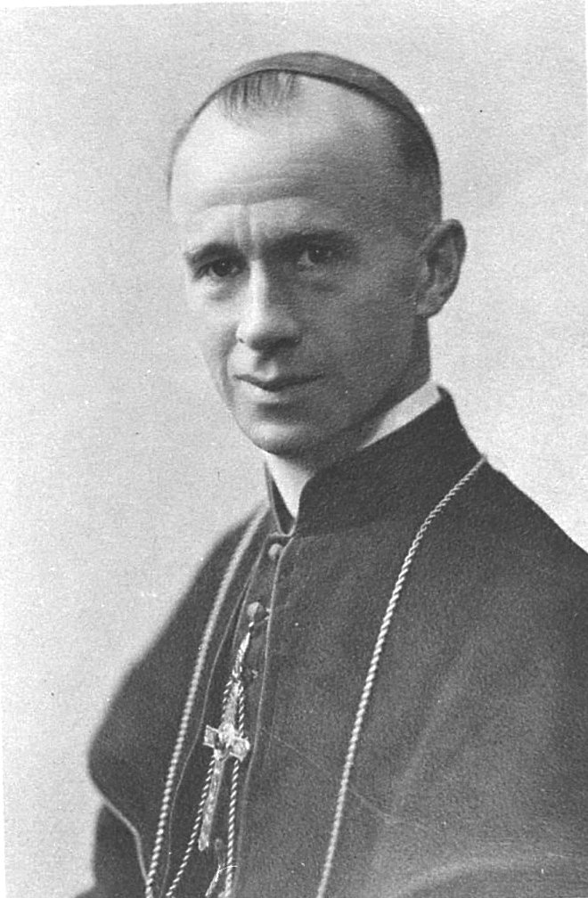 Mgr Napoléon-Alexandre Labrie, quatrième vicaire apostolique de la Côte-Nord de 1938 à 1946